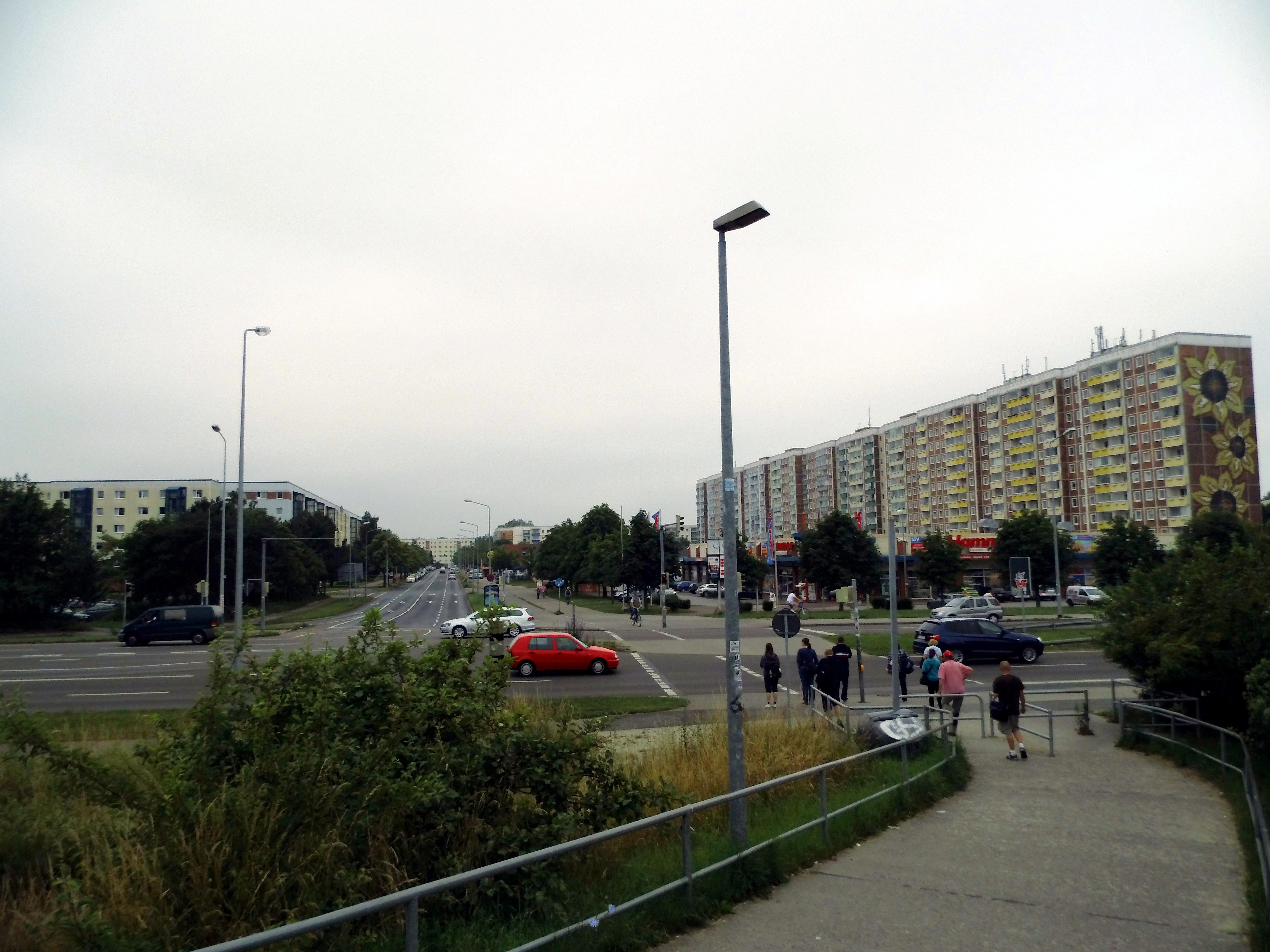 Lichtenhagens Kreuzung zentral von der S-Bahn-Brücke